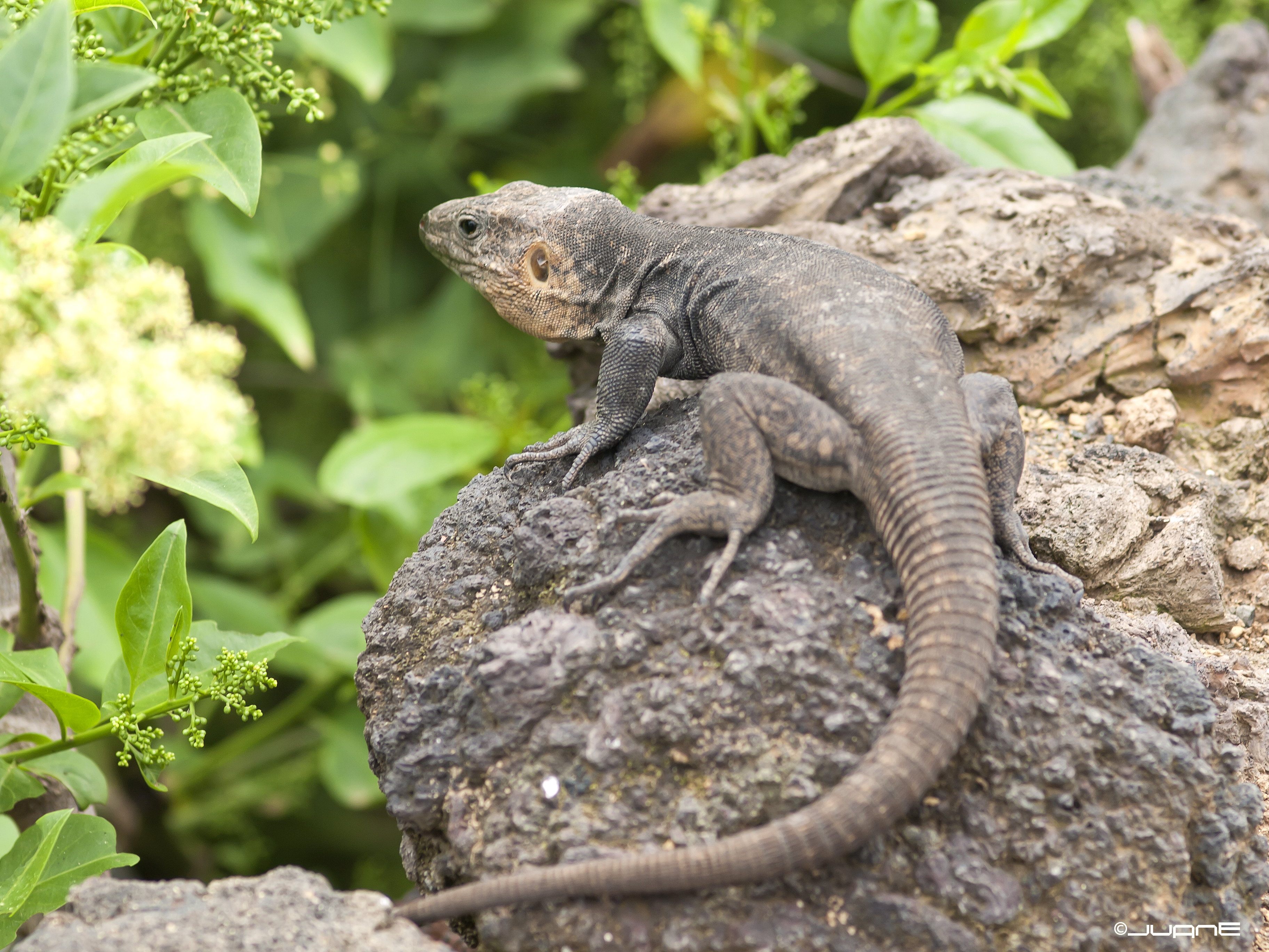 Oly 510 + sigma 105mm